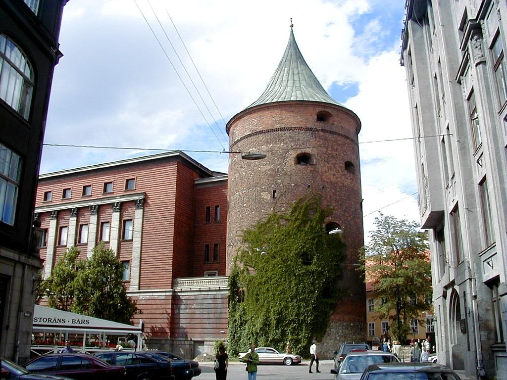 Rīga, Kara muzejs ar Pulvertorni. 1999-08-12